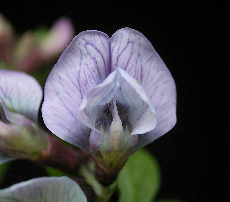 Vicia sepium